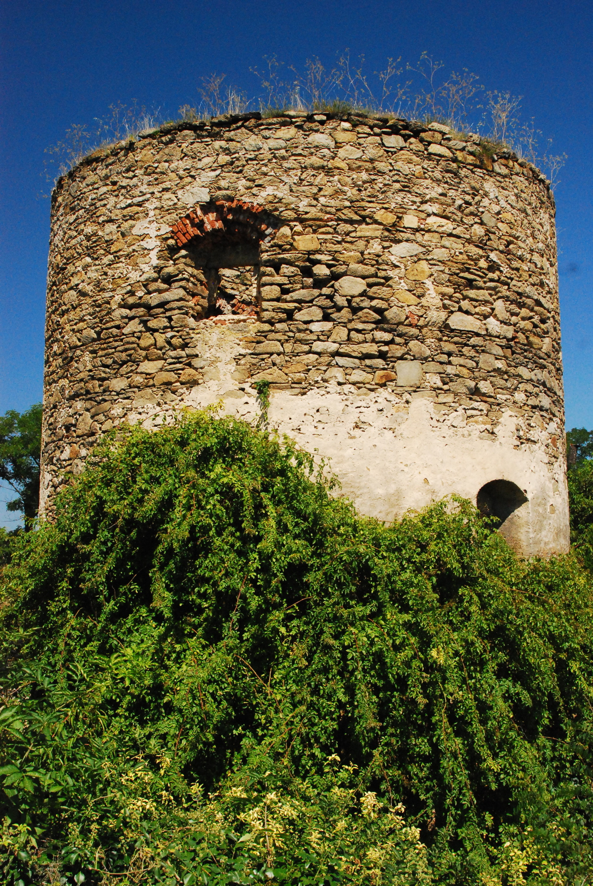 Haberfeld- oder Haberveldturm der Stadtbefestigung von Retz in Niederösterreich